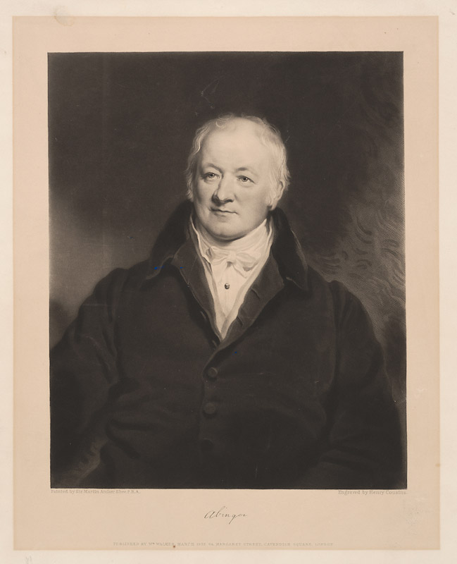 James Scarlett, 1st Baron Abinger (1769-1844)